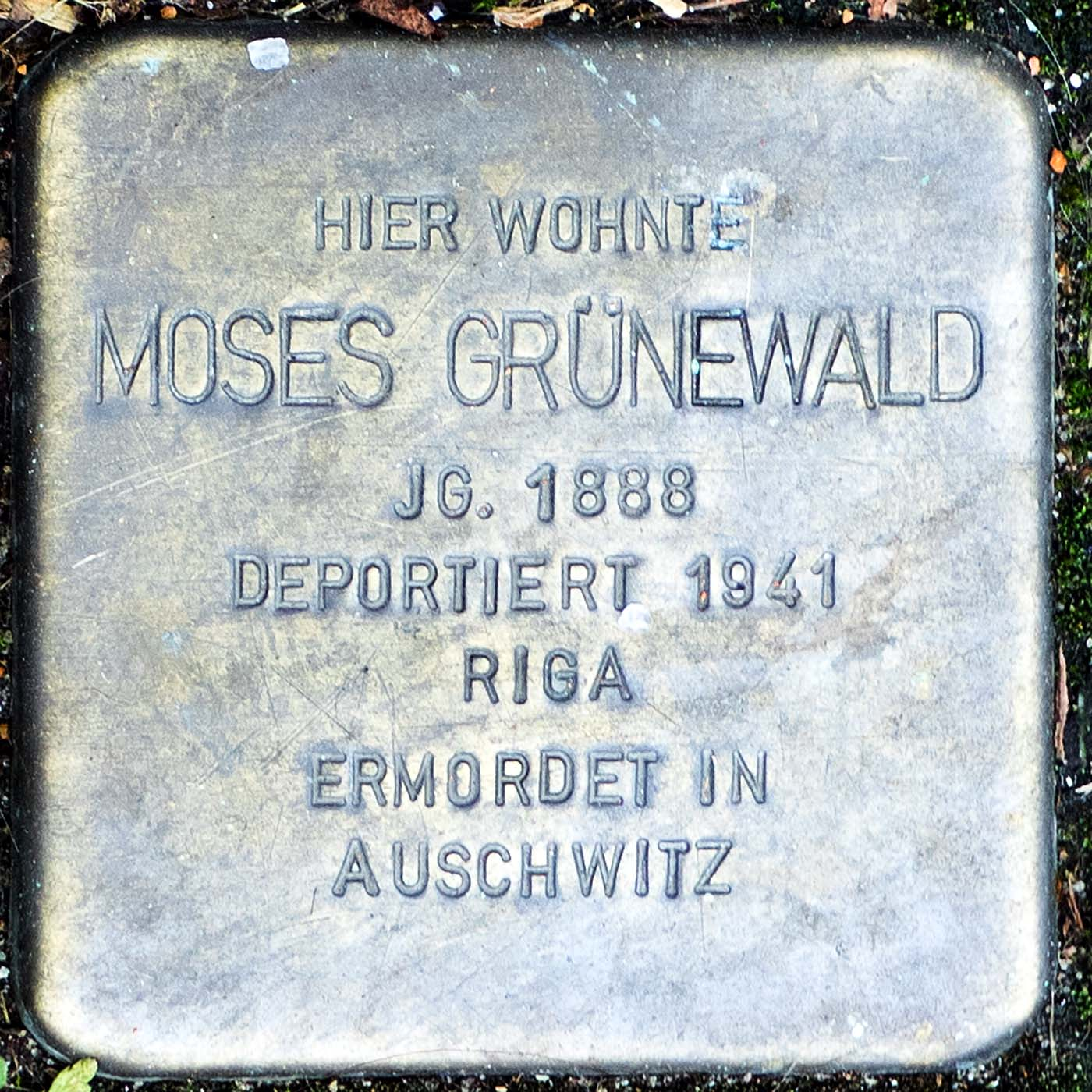 Stolperstein für Moses Grünewald (Willich)